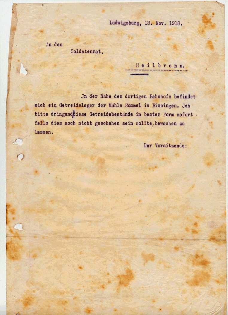 Soldatenrat Ludwigsburg